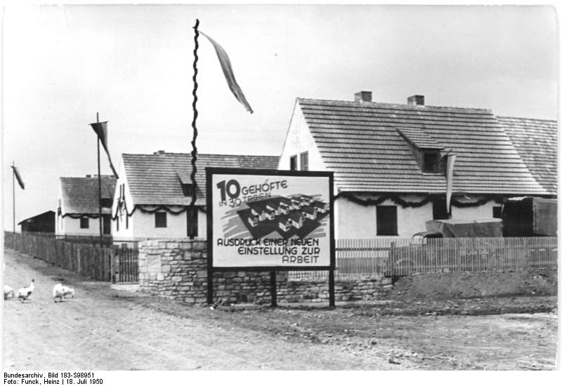 Bruchstedt, Informationstafel zu Neubauten Illus Funck 7269-50 18.7.50 Qu. Bruchstedt neu erstanden. In knapp 50 Tagen wurden die durch die Unwetterkatastrophe am 23. Mai 1950 in Bruchstedt-Thüringen zerstörten Gehöfte, Wohnhäuser und Stallungen neu erbau. Auf einer Feier am 17.7.50 übergab die Landesregierung Thüringen der Einwohnerschaft von Bruchstedt 13 neuerbaute Gehöfte, sechs Wohnhäuser, 1 Schule und zahlreiche andere Bauten. UBz: Die neuen Häuser von Bruchstedt.